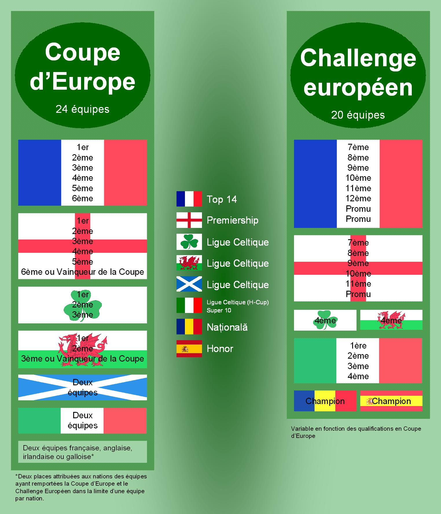 European Rugby-fr